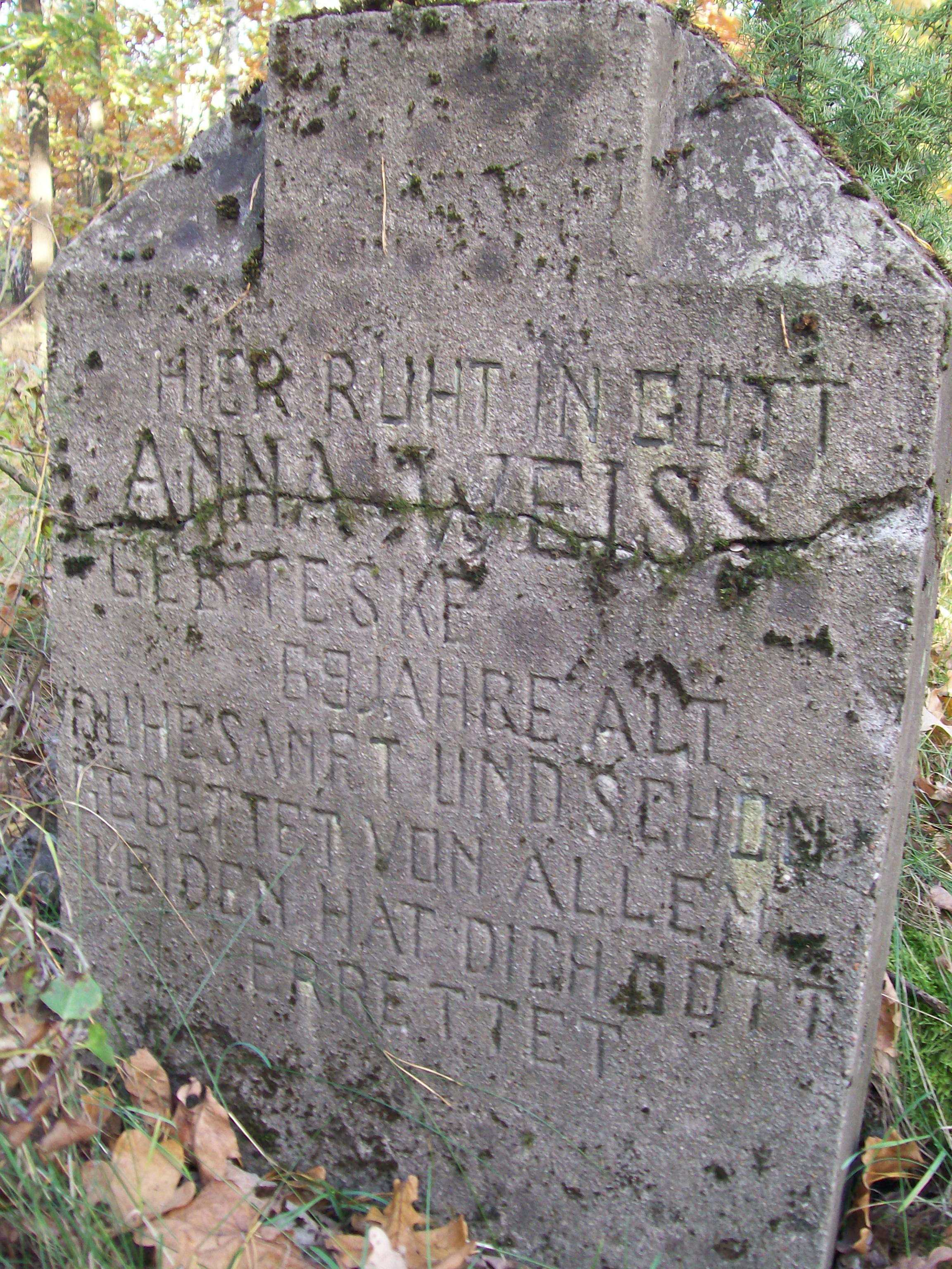 Nagrobek na Cmentarzu Ewangelickim w Gozdach.